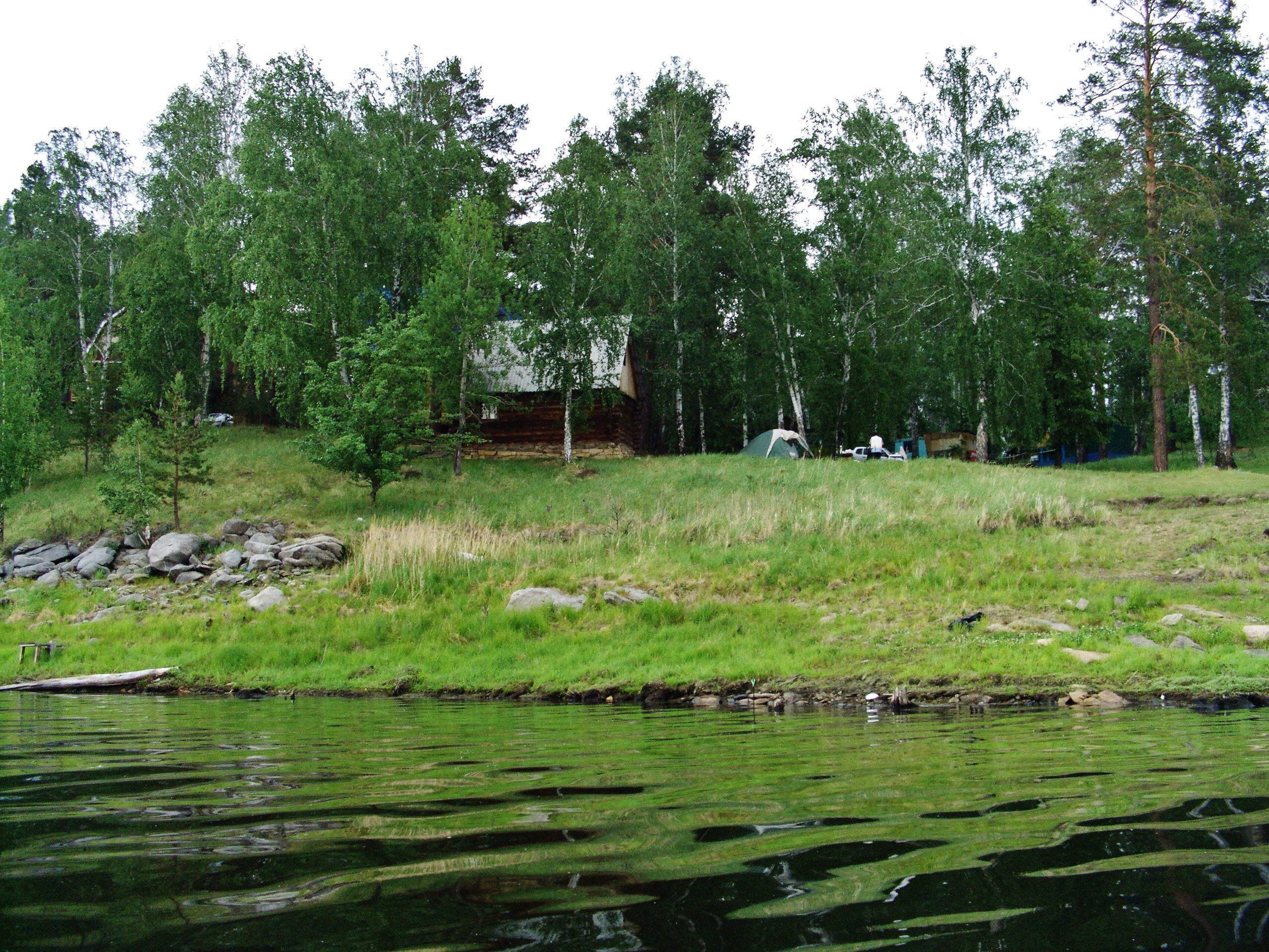 Аргазинское водохранилище.